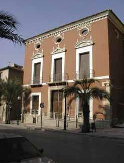 Casa del Cisco de Aspe, Centro Social y Cultural. Alberga el Museo Histórico Municipal, servicios sociales, culturales y sanitarios.